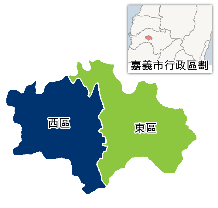 嘉義市行政區劃